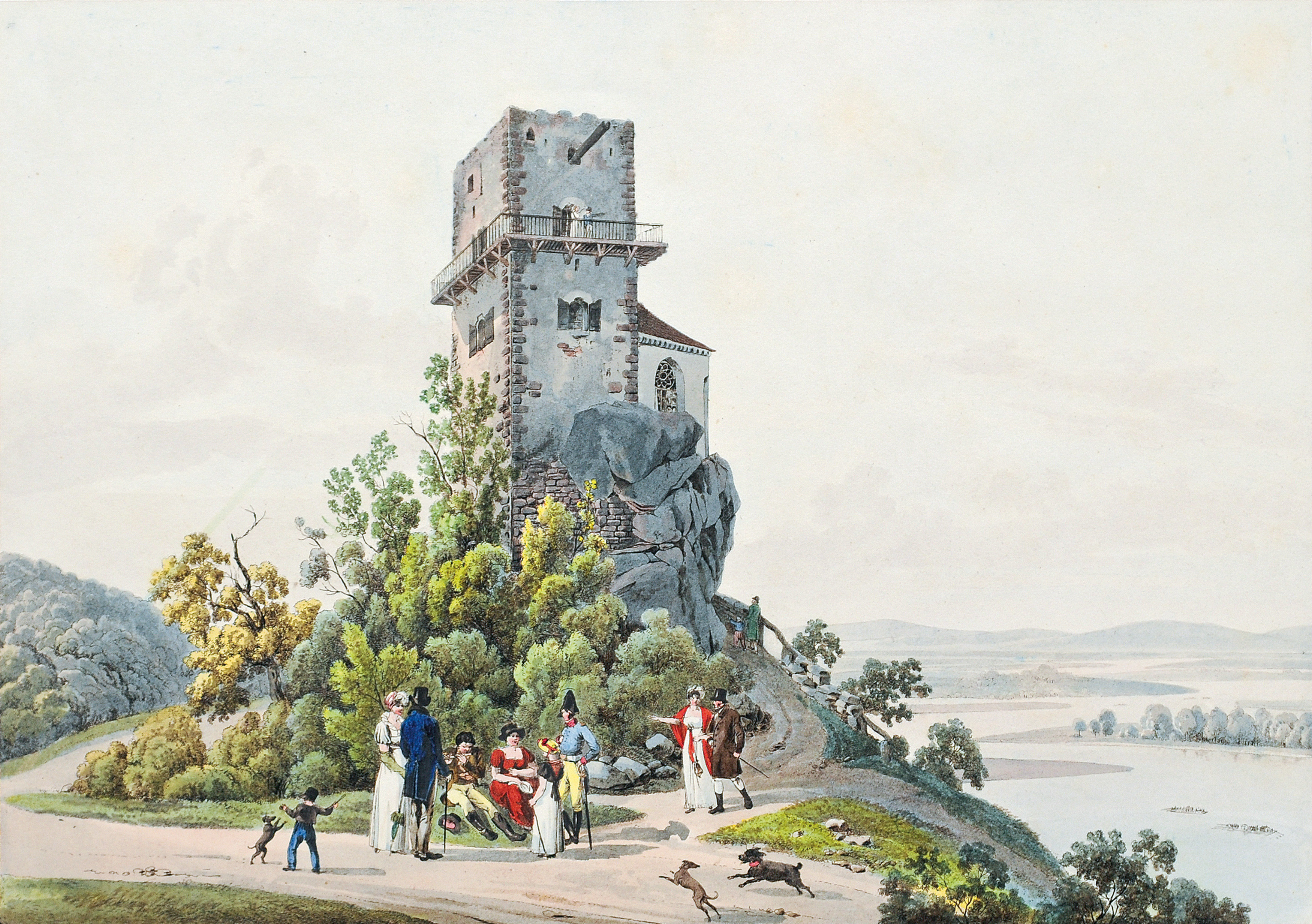 Das Bergschloss Greifenstein an der Donau, 1812, Radierung, koloriert, Platte: 32 x 41,1 cm, Blatt: 33,3 x 43 cm bez. unten rechts: Nach der Natur gezeich. u. radirt v. J. A. Klein 1812 Inv.-Nr. GR 2956